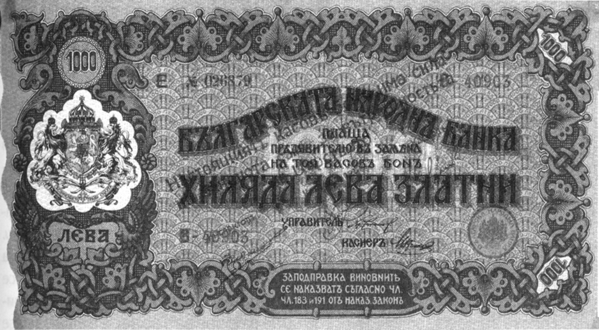 Касов бон, издаден от БНБ